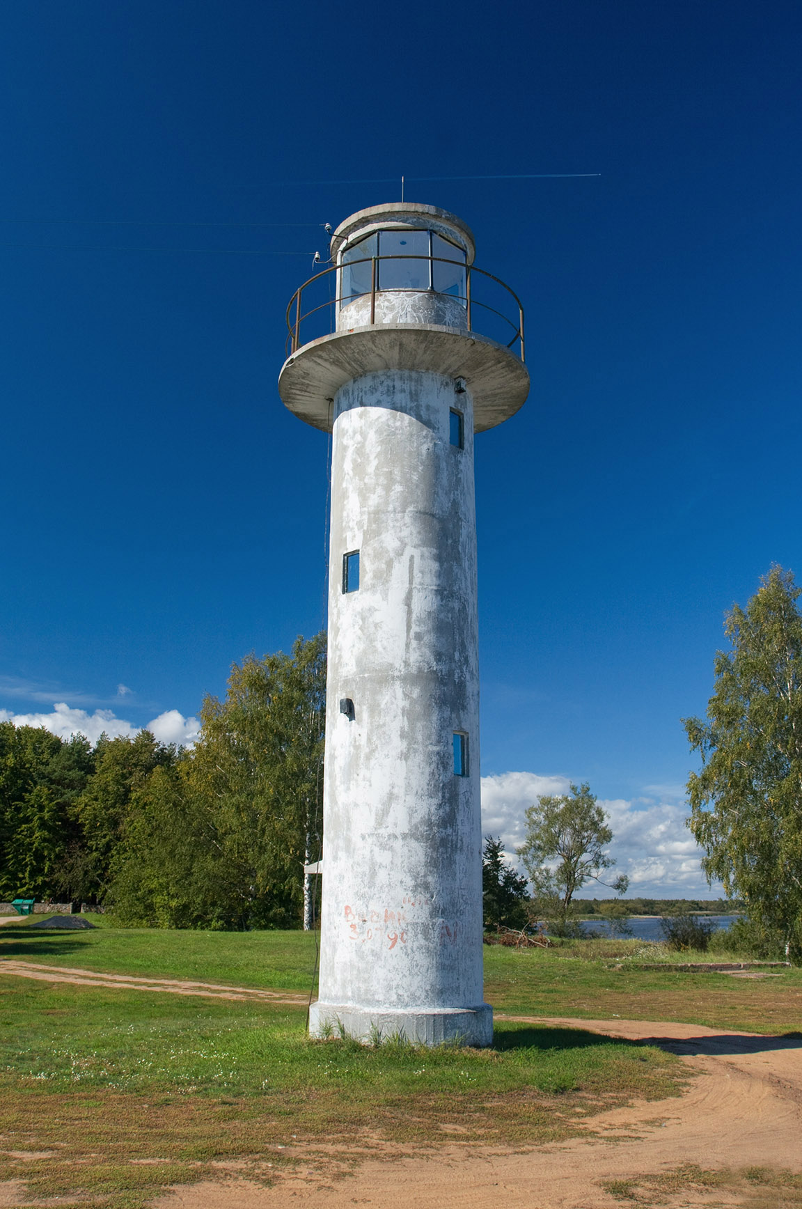 Ninaküla tuletorn